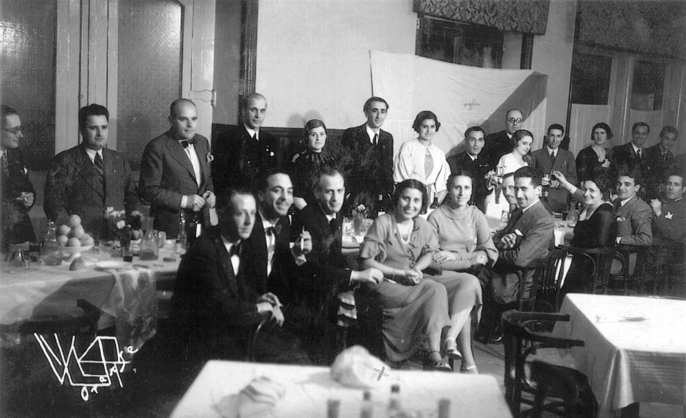 16 June 1933, Hotel Miño, Ourense. Banquete galeguista a Emilia Docet e a Manuel Luís Acuña. De pé, de esquerda a dereita: Vicente Risco, un reloxeiro d´El Cronómetro, Ramiro Illa Couto, Leuter González Salgado, Ánxeles Otero, Álvaro Cunqueiro, Emilia Docet, Manuel Luís Acuña, Ramón Otero Pedrayo, Mari Luz Morales, Ricardo Fernández Morales, María Josefa Bustamante, Eduardo Blanco Amor e Xoán Luís Ramos Colemán. Sentados, de esquerda a dereita: Miguel Valencia, J. Villagarcía, Roberto Vázquez-Monxardín, Elina Carballo, Esther Peña Bouzas, Alberto Vázquez-Monxardín, Manuel Peña Rei, Emilia Blanco Maneiro, Xosé Goyanes e Daniel Piñeiro.